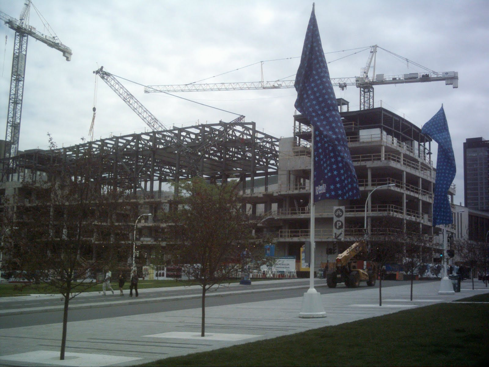 L'Adresse symphonique en chantier